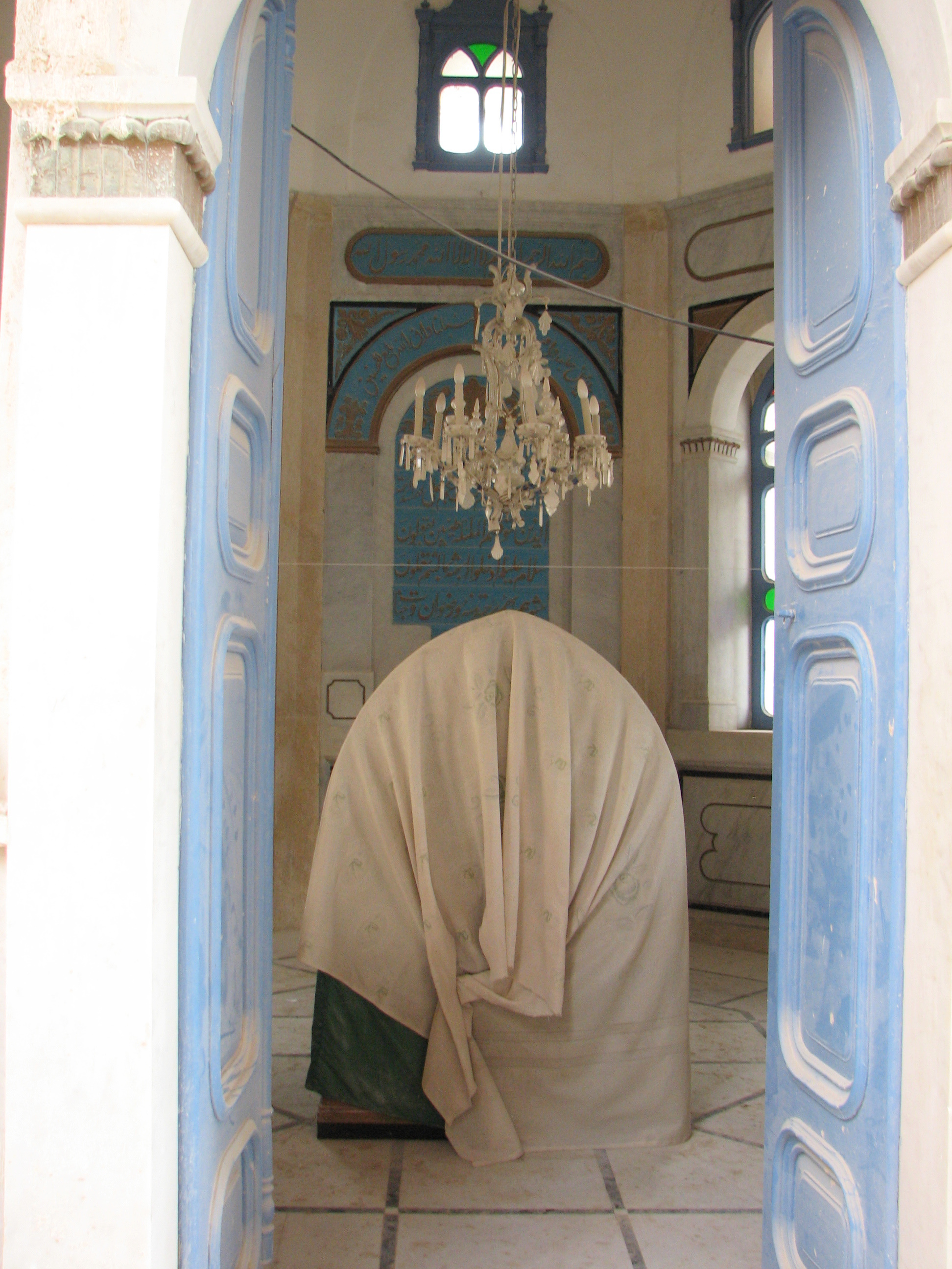 Akko, El Shazliya Mosque under construction. The cost of construction is estimate 80 M $ מסגד אל -שאזליה בעכו. מרכז השאזלים נמצא בלבנון. במשך שנים מרכז זה נזנח והשוכרים הרחיבו את בתיהם. השאזלים החליטו לשפץ אץ המקום הם פינו את הדיירים תוך מתן פיצויים והחלו בשיפוץ האתר הכולל מסגד מבנים וקברים. ההשקעה המוערכת במבנה באתר היא 80 מליון דולר אתר מתוכנן לקבורה